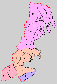 宮城県本吉郡の町村。